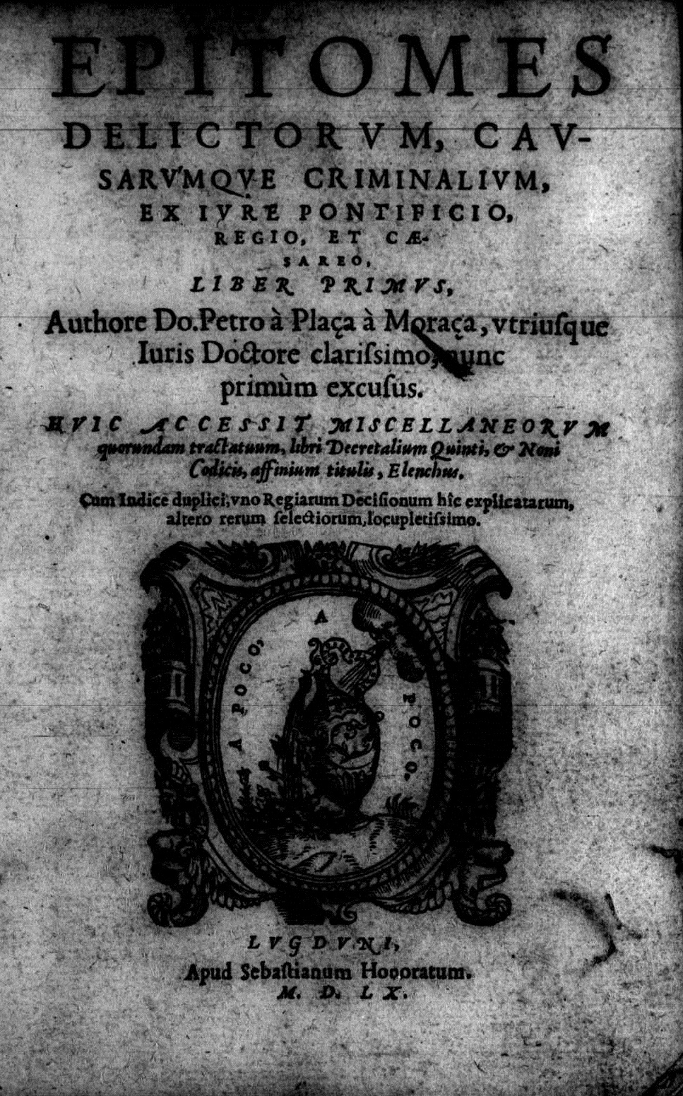 Frontespizio